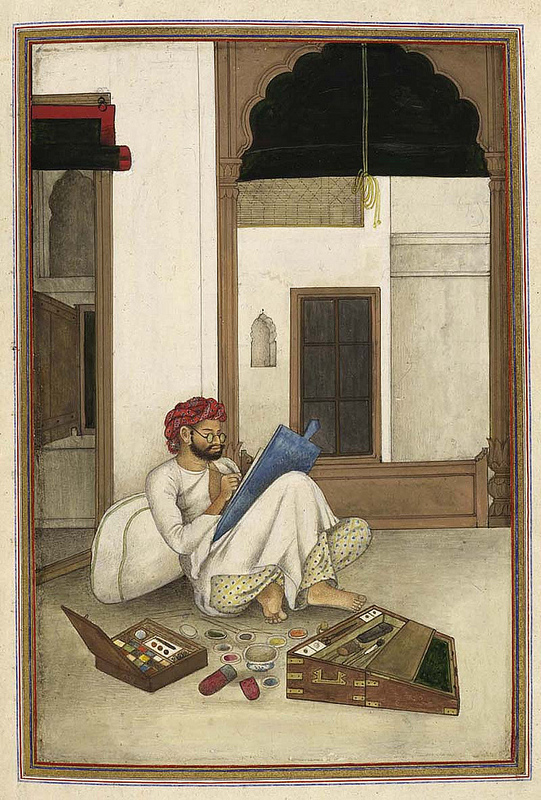 മസർ അലി ഖാൻ വരച്ച സ്വന്തം ചിത്രം